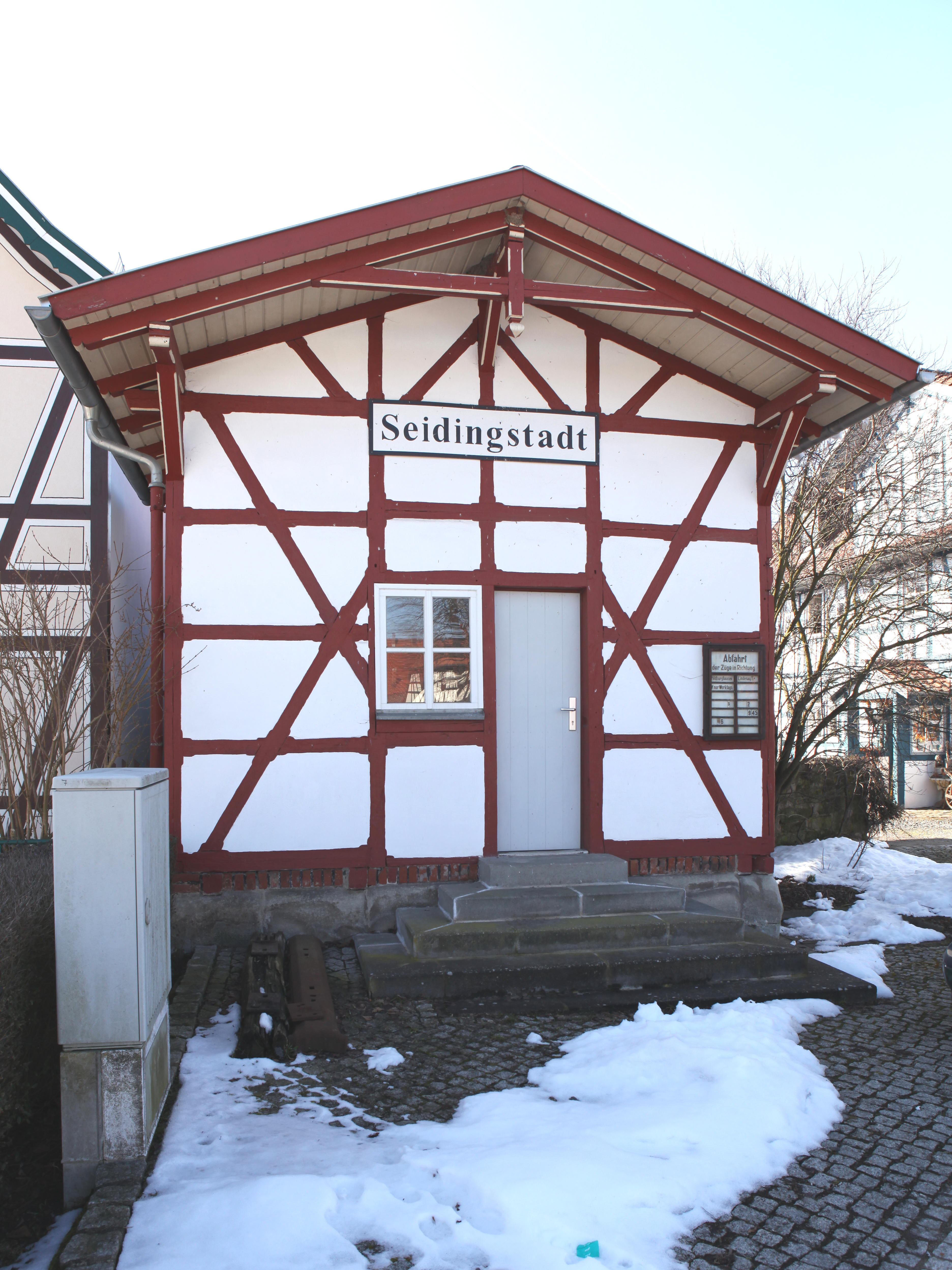 Ehemaliger Bahnhof, heute Bahnhofsmusuem, in Seidingstadt, OT von Straufhain, Landkreis Hildburghausen